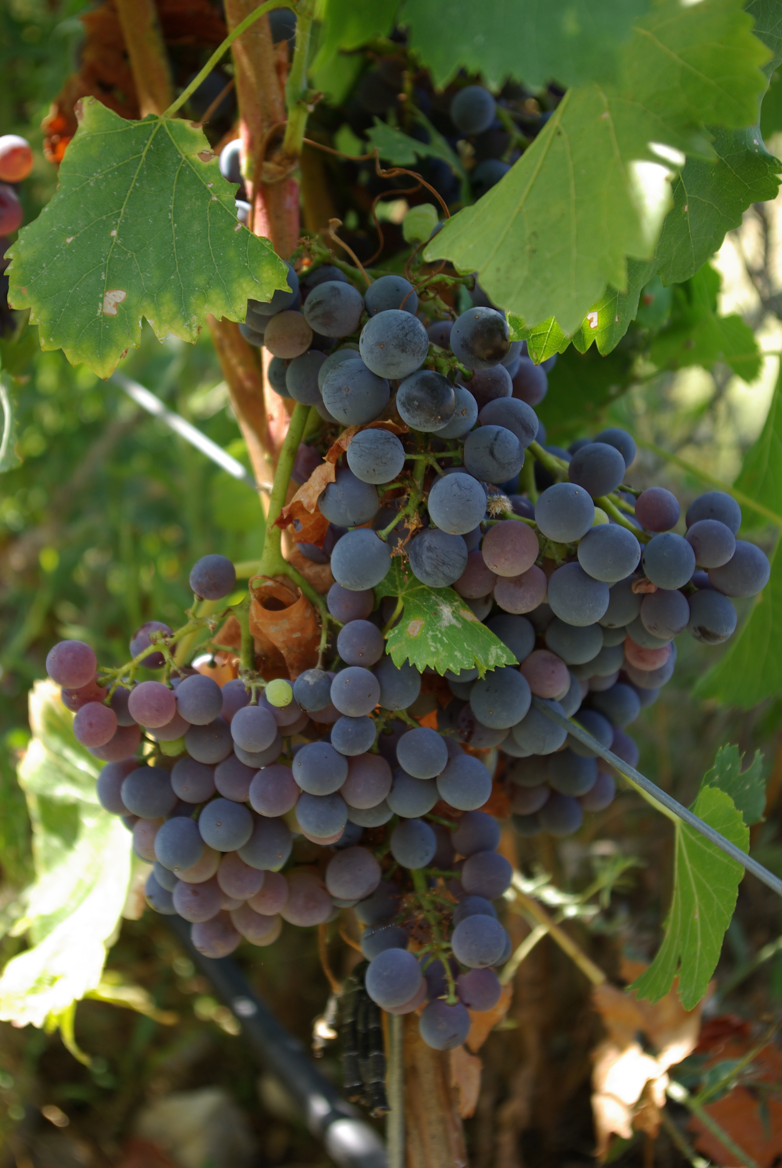 Grenache grapevariety